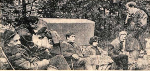 Ustvarjalci novega slovenskega filma Onkraj med odmorom.